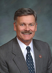 Colorado state representative Al White